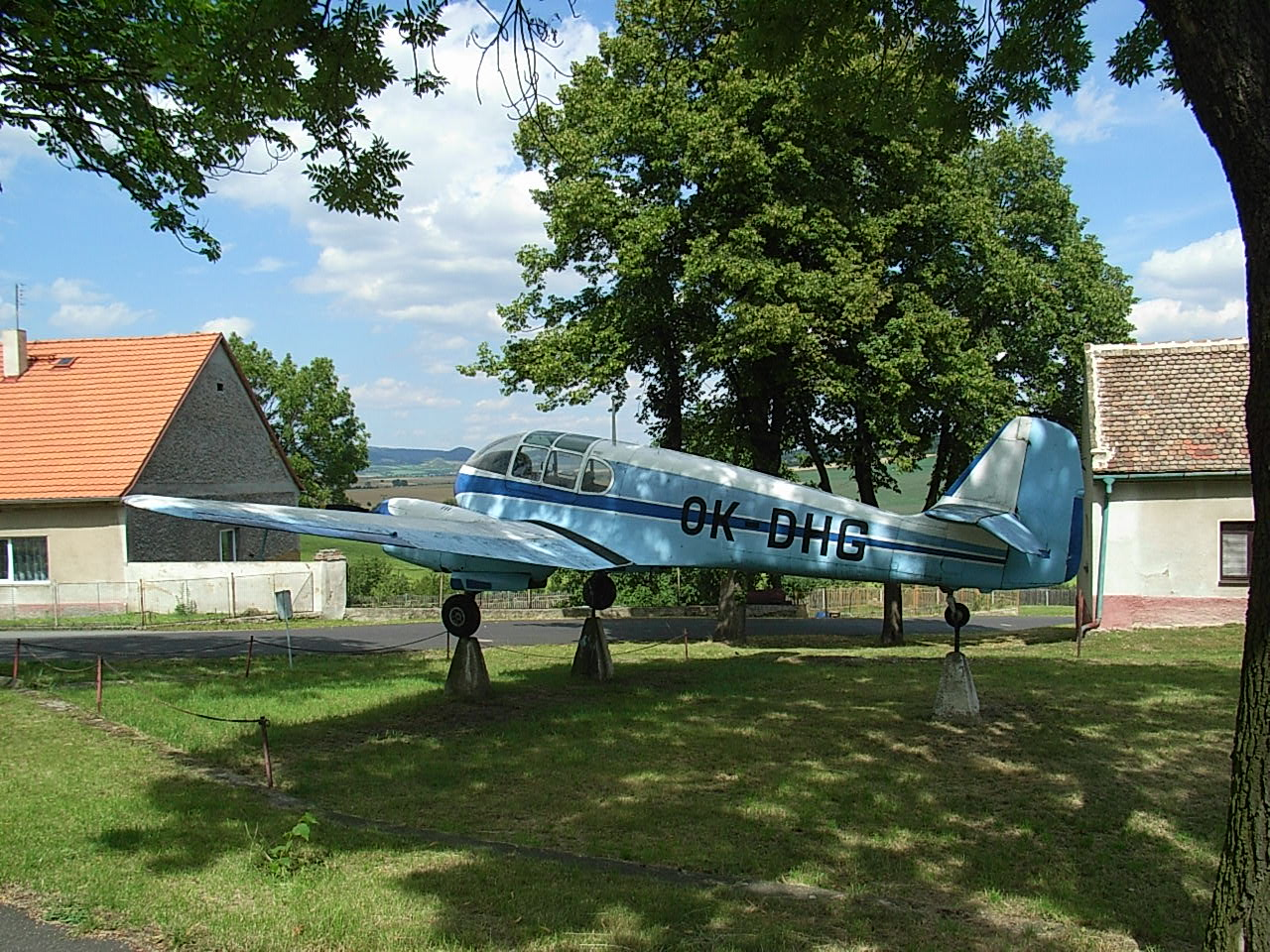 Vysloužilý letoun Aero Ae-45 v Rané, okres Louny.